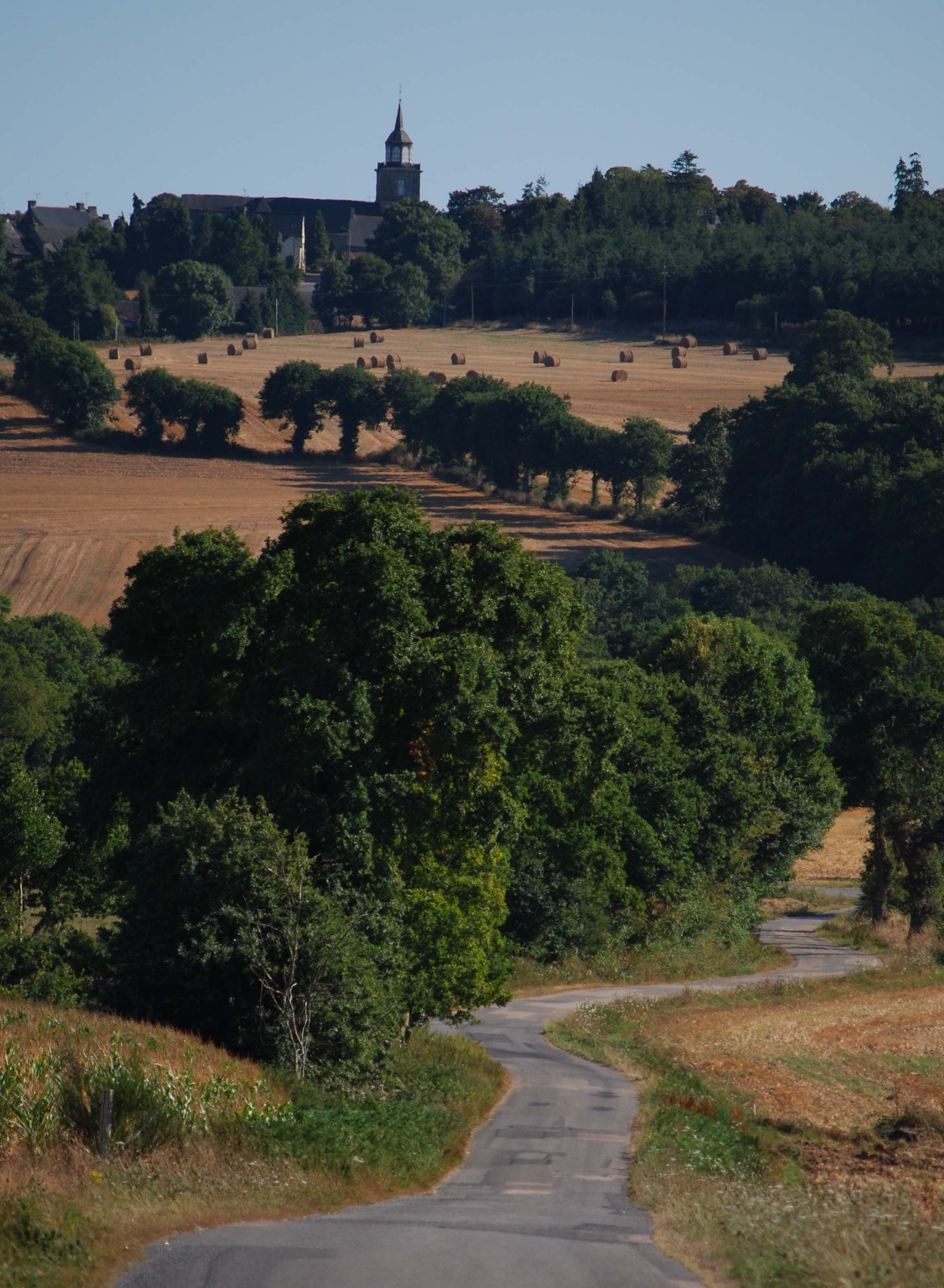 Route menant vers le bourg